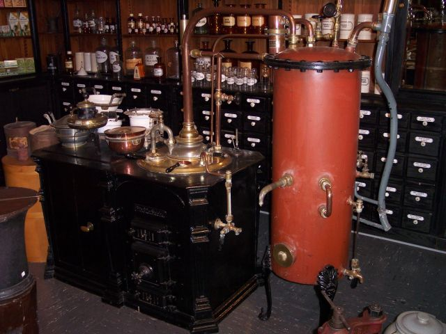 Destillierapparate einer Apotheke um 1900